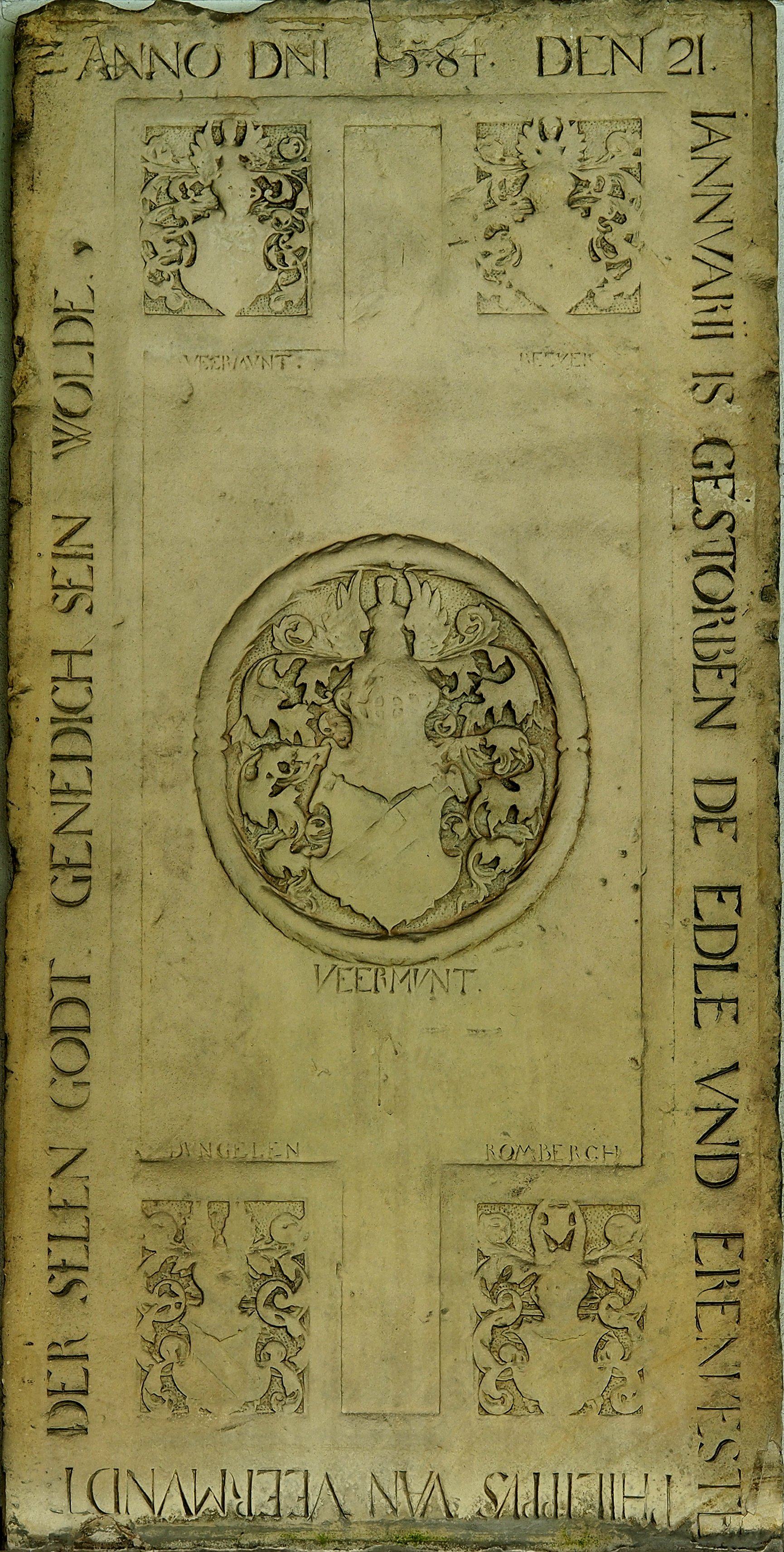 Grabstein von Philipp d.J. von Viermundt in Castrop Rauxel, Vollender des Schlosses Bladenhorst und Wegbereiter der Reformation in Bladenhorst, Waldfriedhof Castrop-Rauxel-Bladenhorst